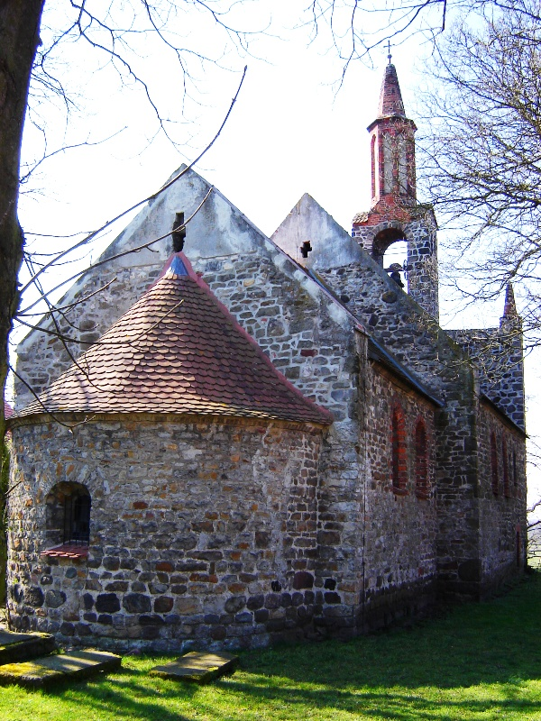 Kirche Hohenwarthe, Sachsen-Anhalt, Ostansicht